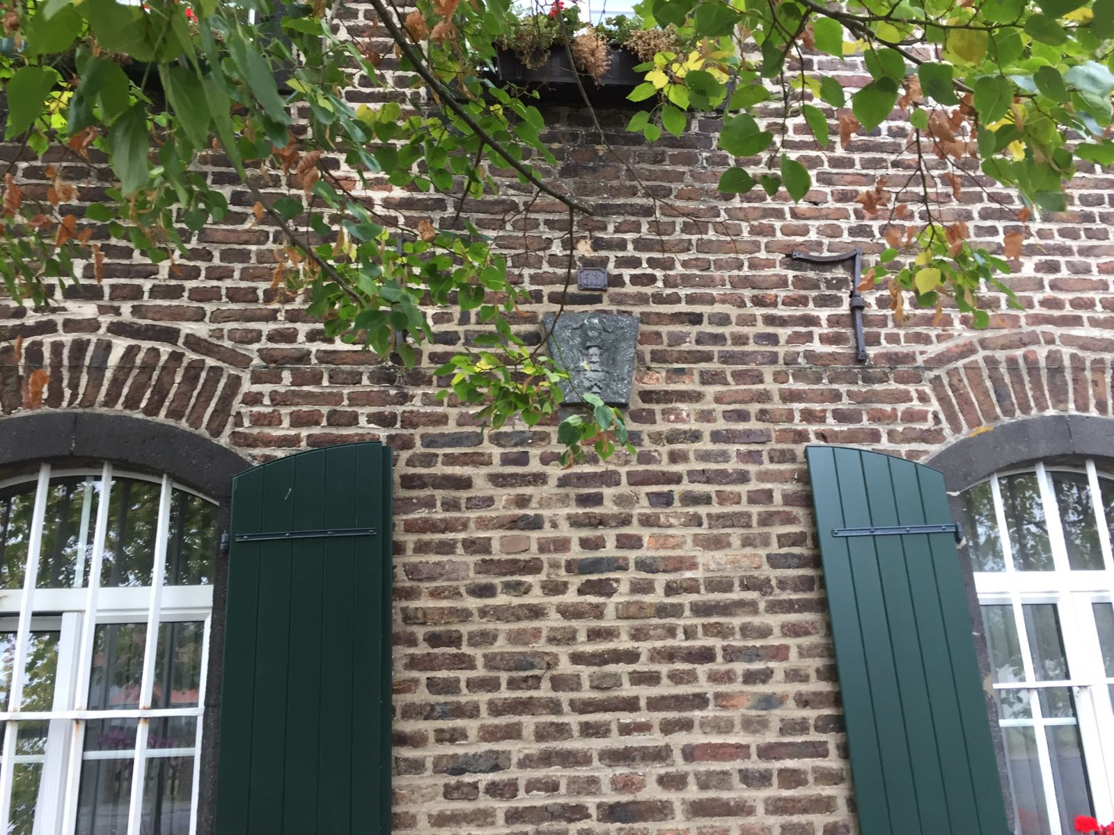 Wappen Gut Antoniterhof in Klein-Vernich